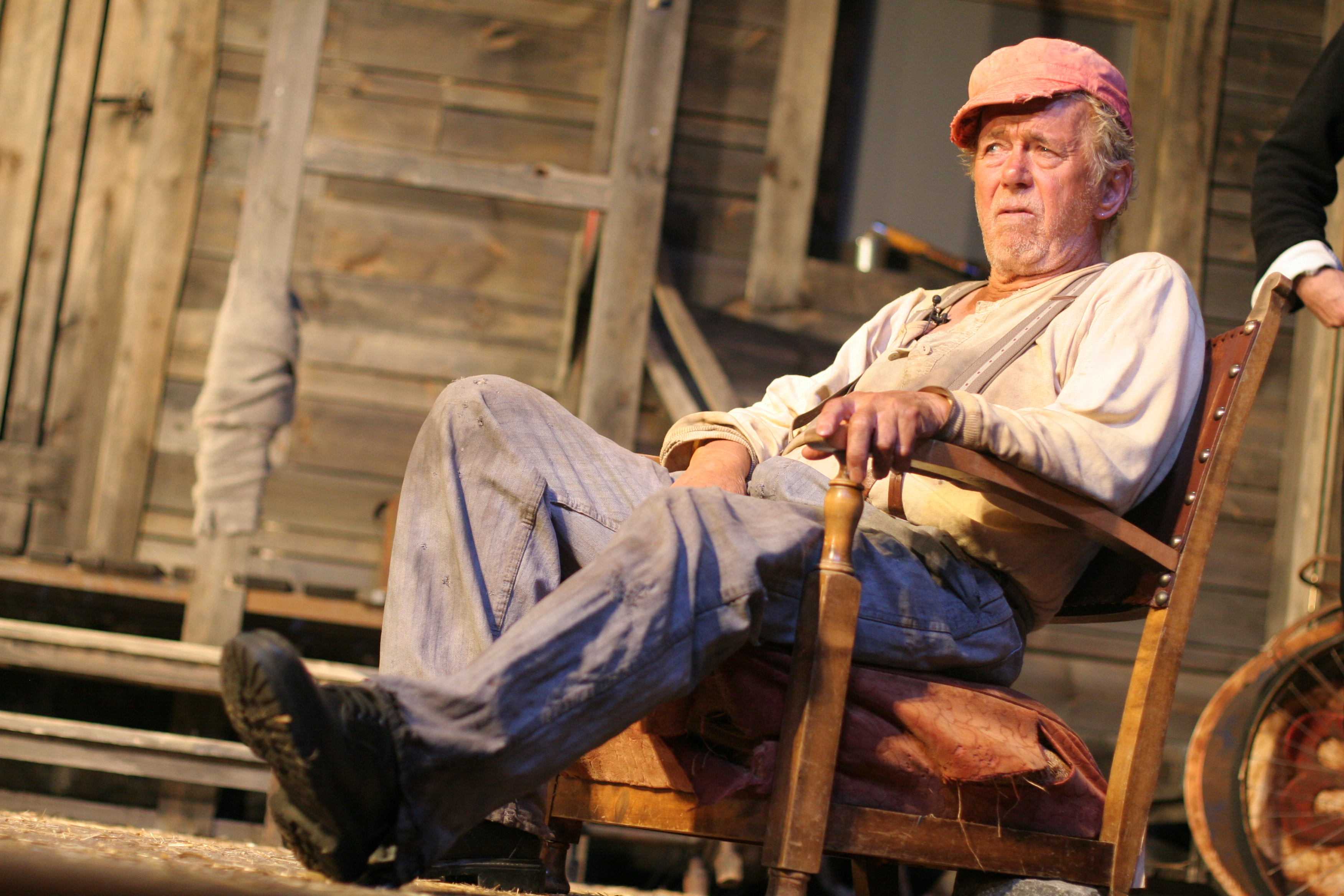 Toralv Maurstad på scenen i "Måne for livets stebarn" på Centralteatret, 2008. Bruk gjerne bildet, så lenge du krediterer meg. / Feel free to use, but please credit me.